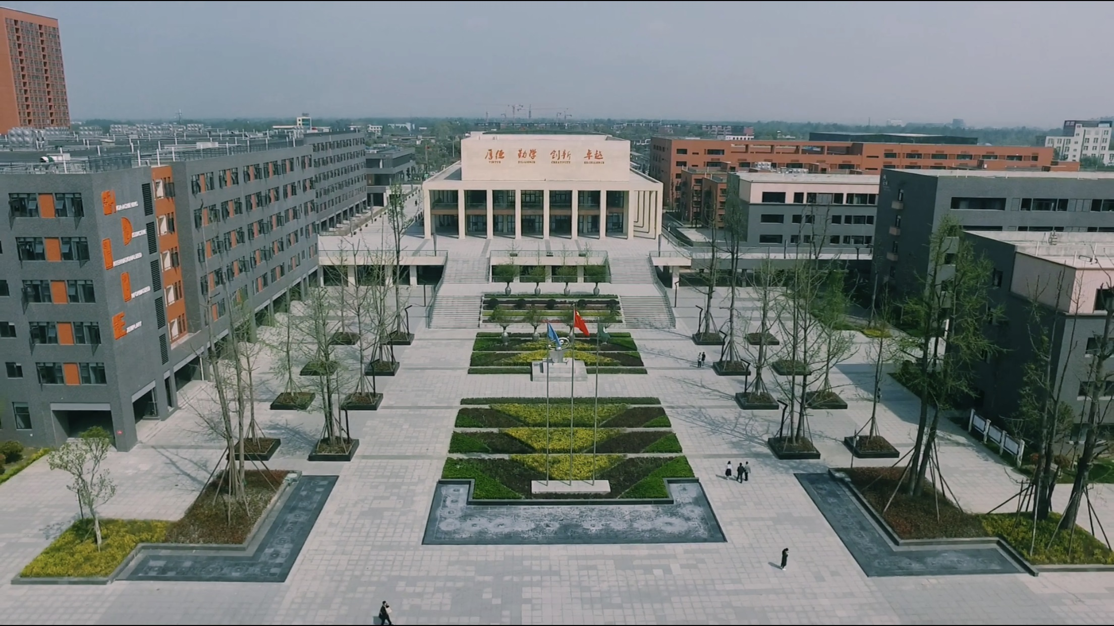 中文（中国大陆）: 成都市实验外国语学校 成都市温江区花都大道东段 489 号